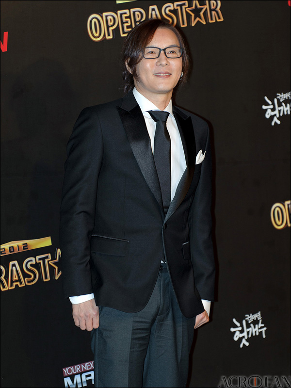 tvN 오페라스타 2012 제작 발표회에 참여한 김종서